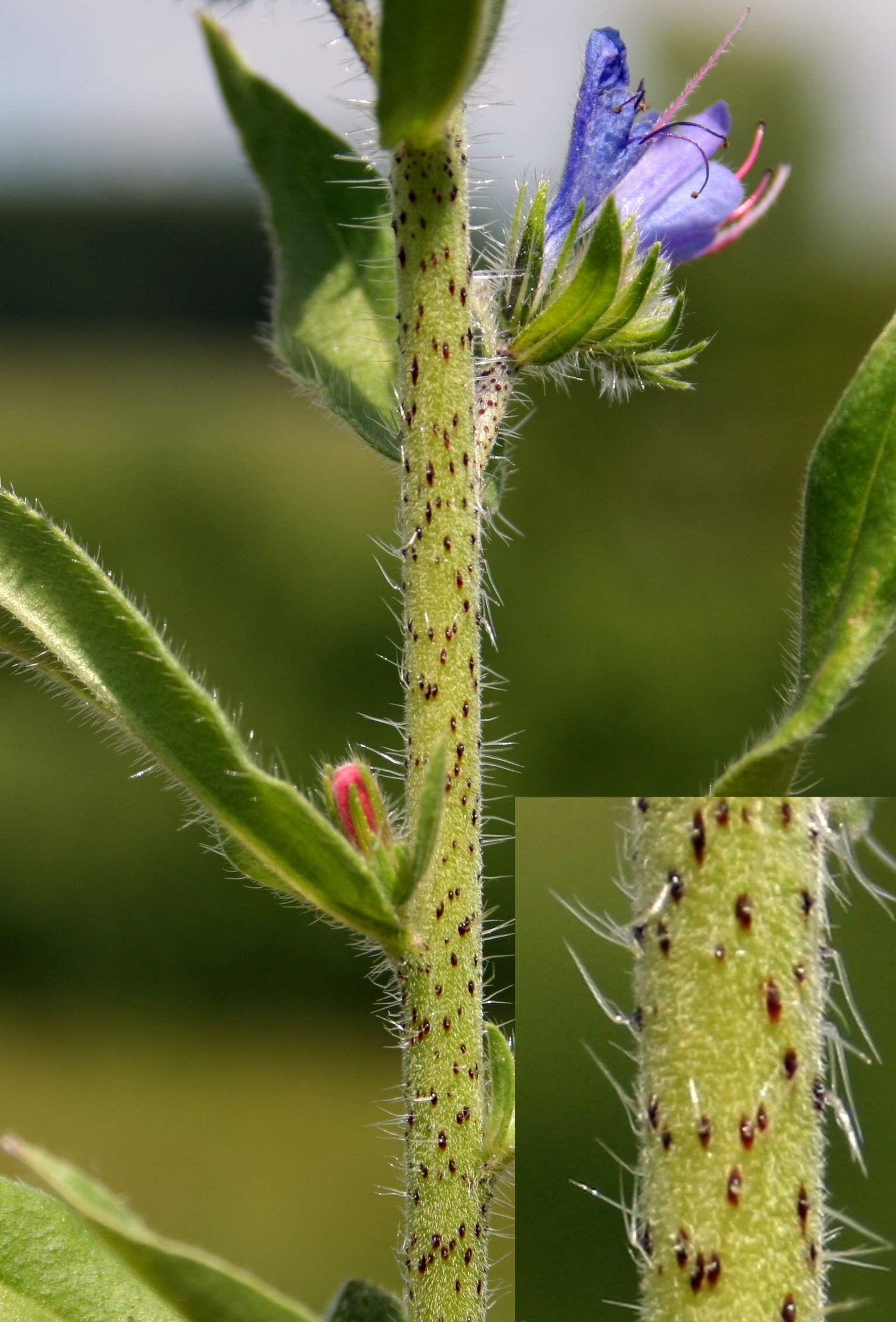 Żmijowiec zwyczajny - łodyga